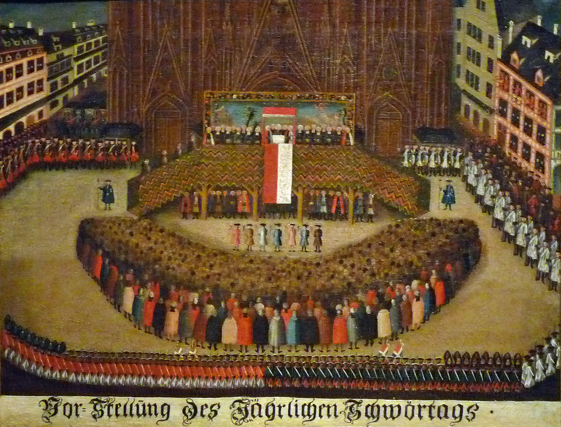 La cérémonie du Schwoertag (serment de fidélité à la Constitution municipale) vers 1785 (huile sur toile, Musée historique de Strasbourg)